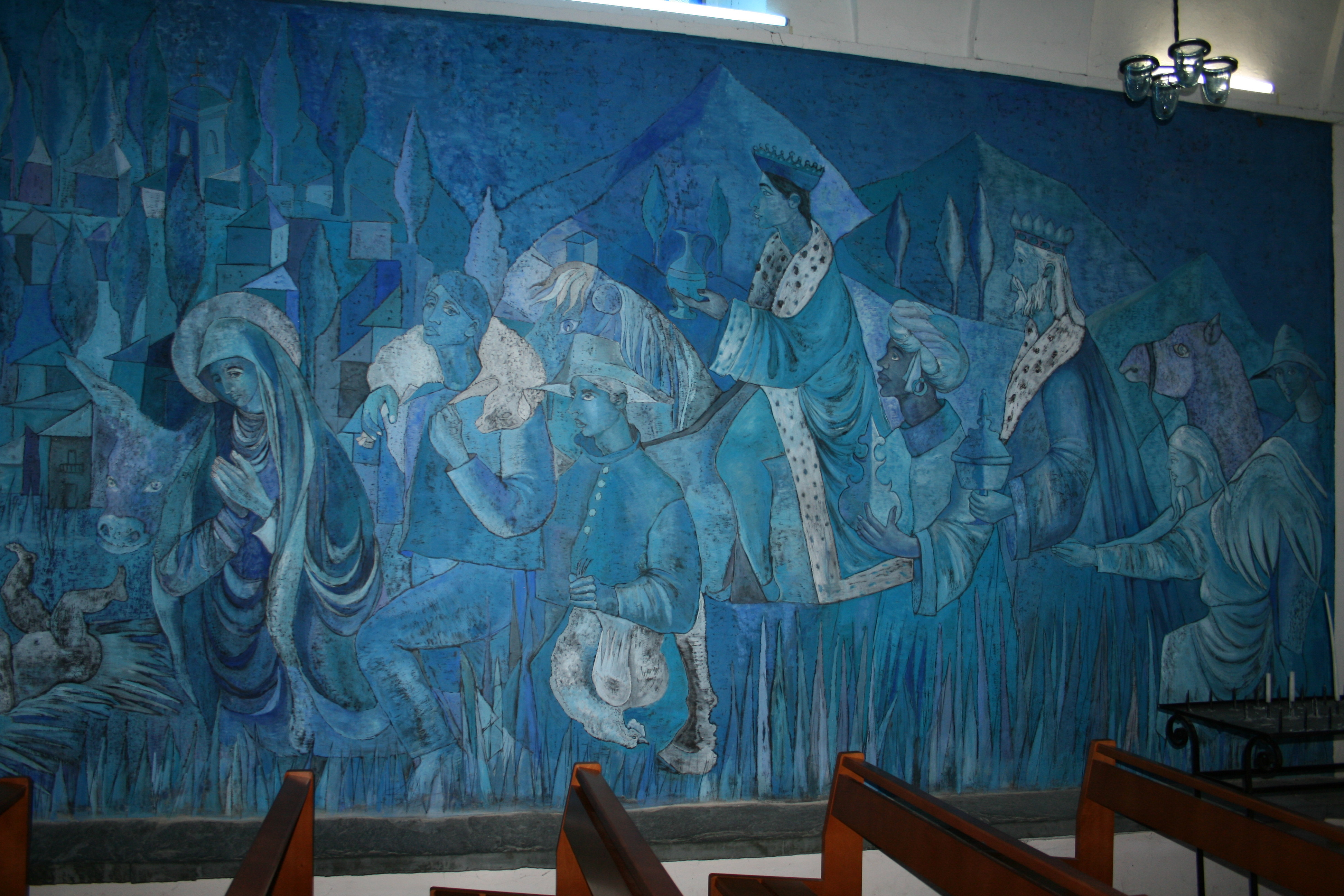 Coaraze, Alpes-Maritimes, France. Chapelle Bleue, fresques d'Angelo Ponce de Léon, 1962. La Nativité.